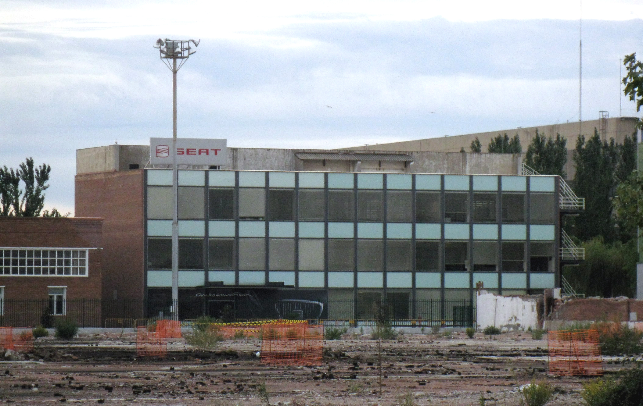 Laboratoris de la fàbrica d'automòbils SEAT a la Zona Franca (Barcelona). Edifici neoracionalista de Rafael Echaide Itarte i César Ortiz-Echagüe (1959-60).